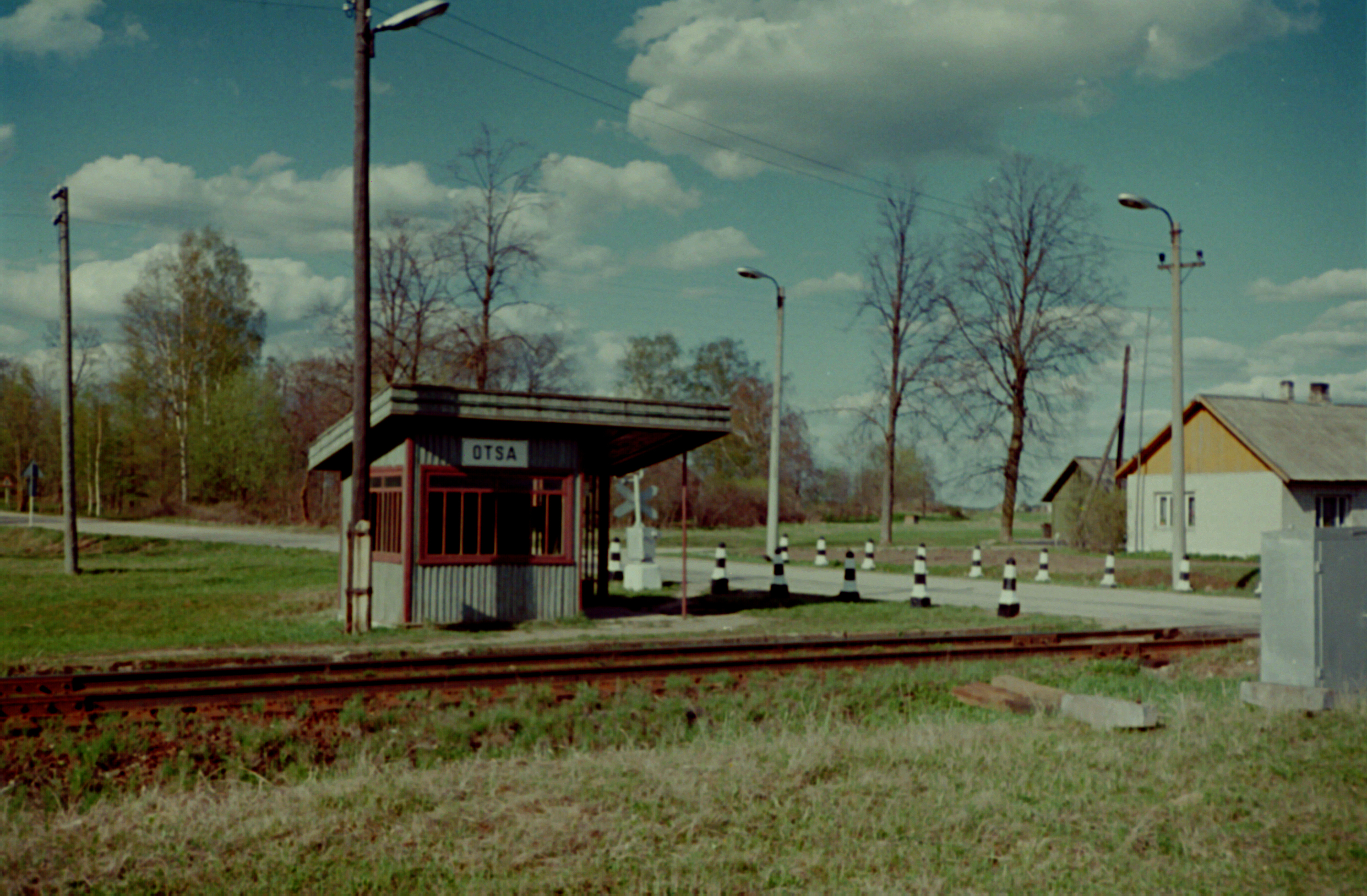 Otsa raudteepeatuskoht